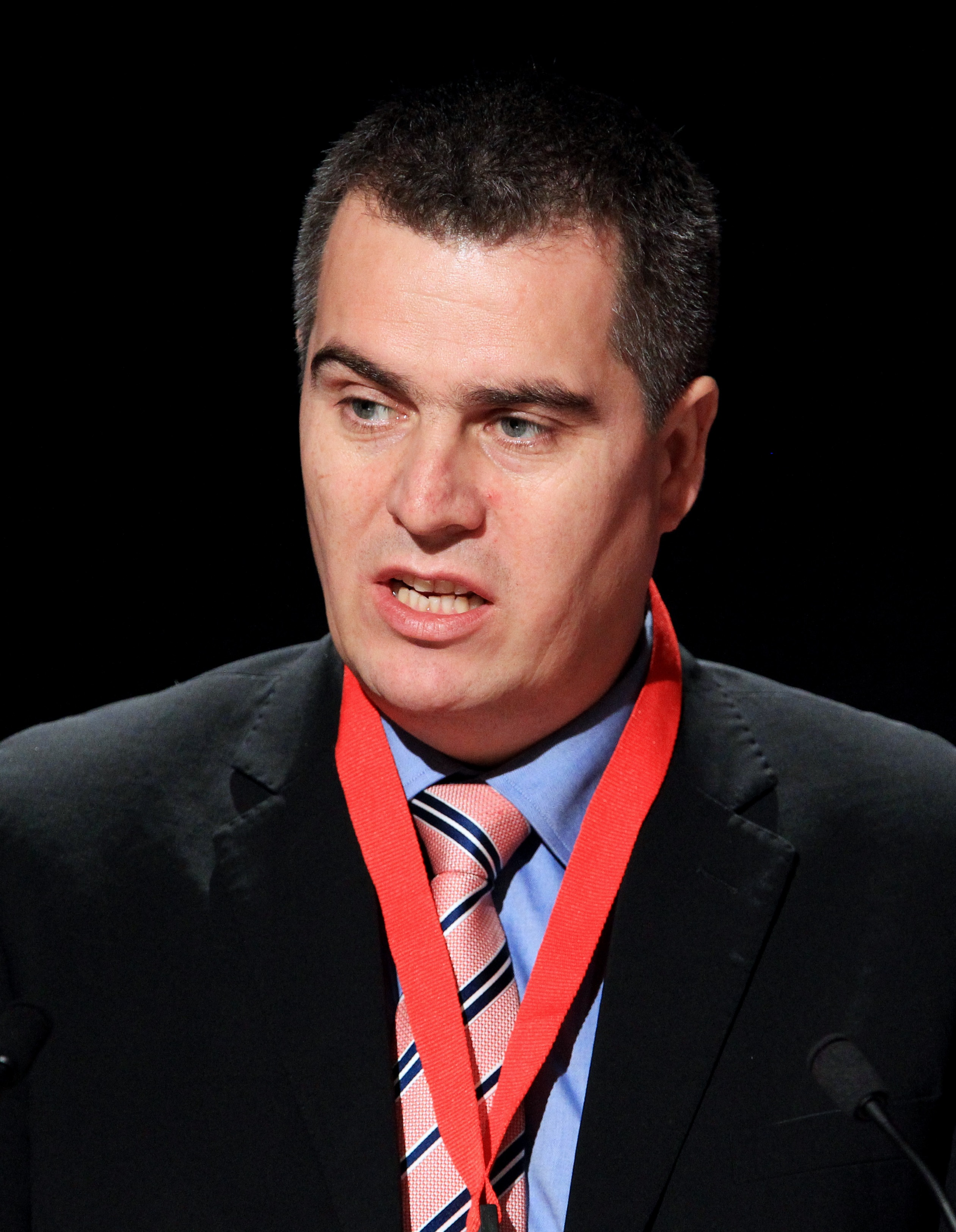 Jens B Frederiksen från Grönland vid vid Nordiska Rådets session i Reykjavik på Island. 2010-11-02.